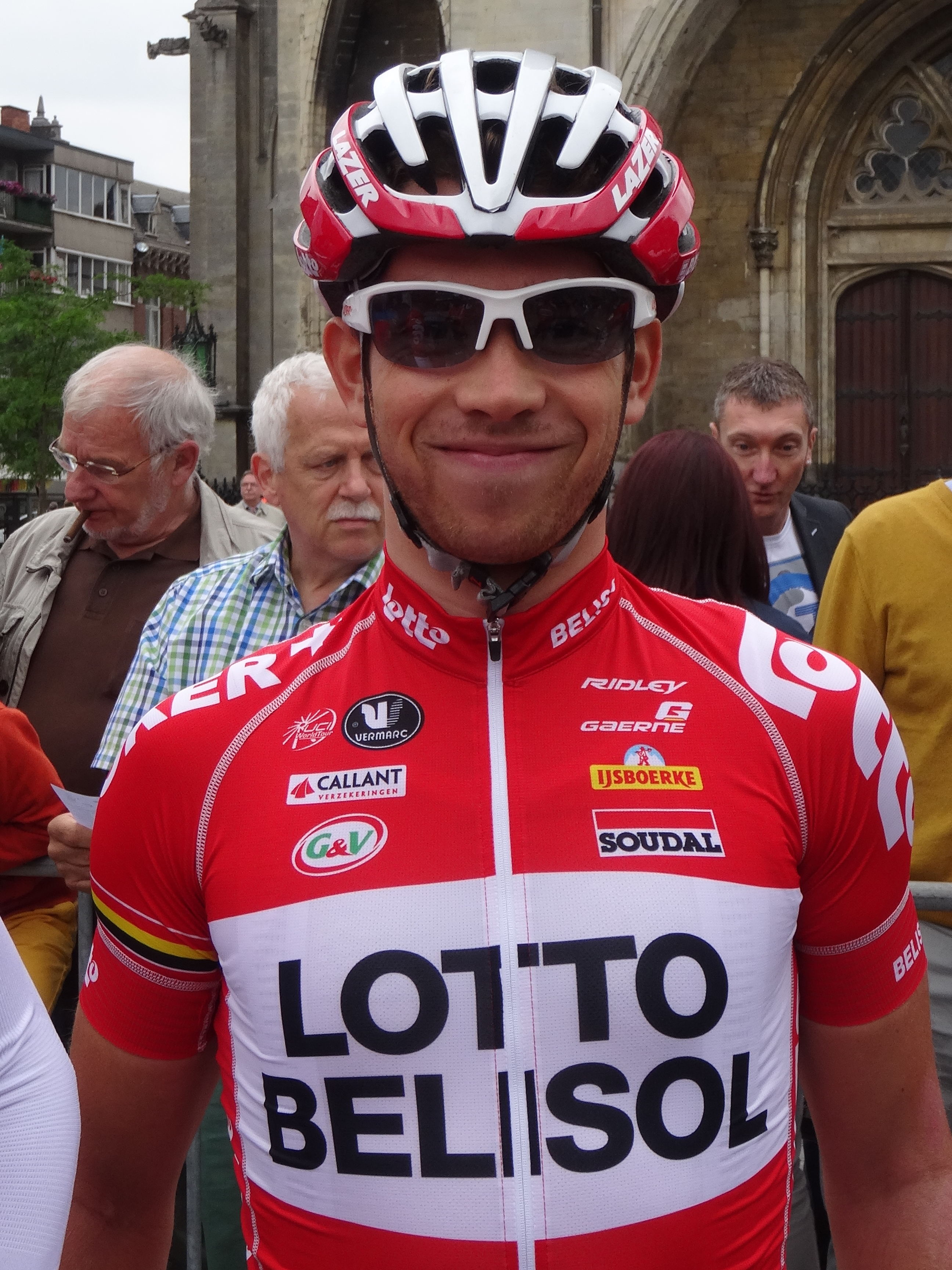 Reportage photographique réalisé le dimanche 15 juin à l'occasion du départ et de l'arrivée du Tour du Limbourg 2014 à Tongres, Belgique.